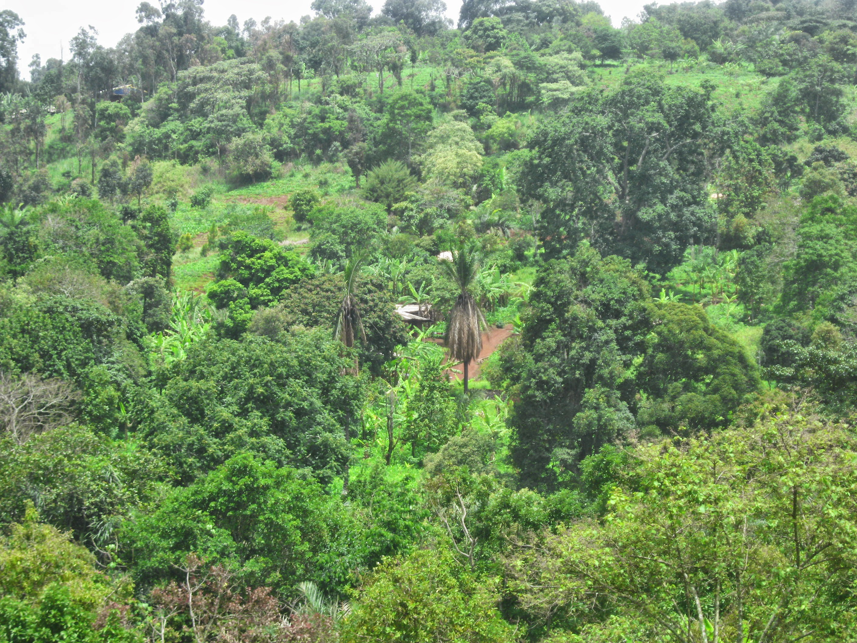 Paysage verdoyant